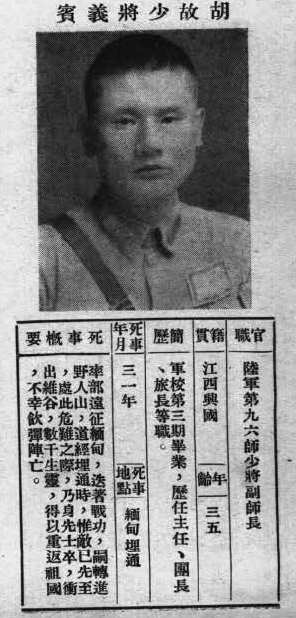 抗戰軍人忠烈錄第一輯中的烈士遺像